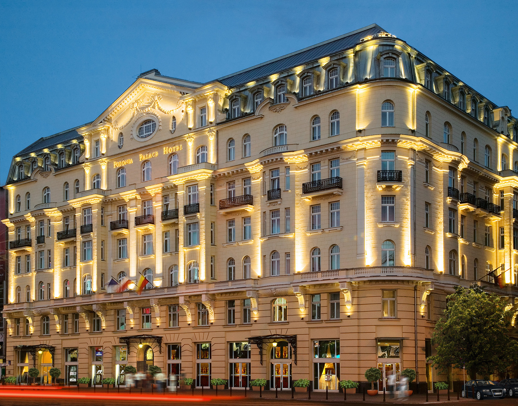 Fasada Hotelu Polonia Palace w Warszawie